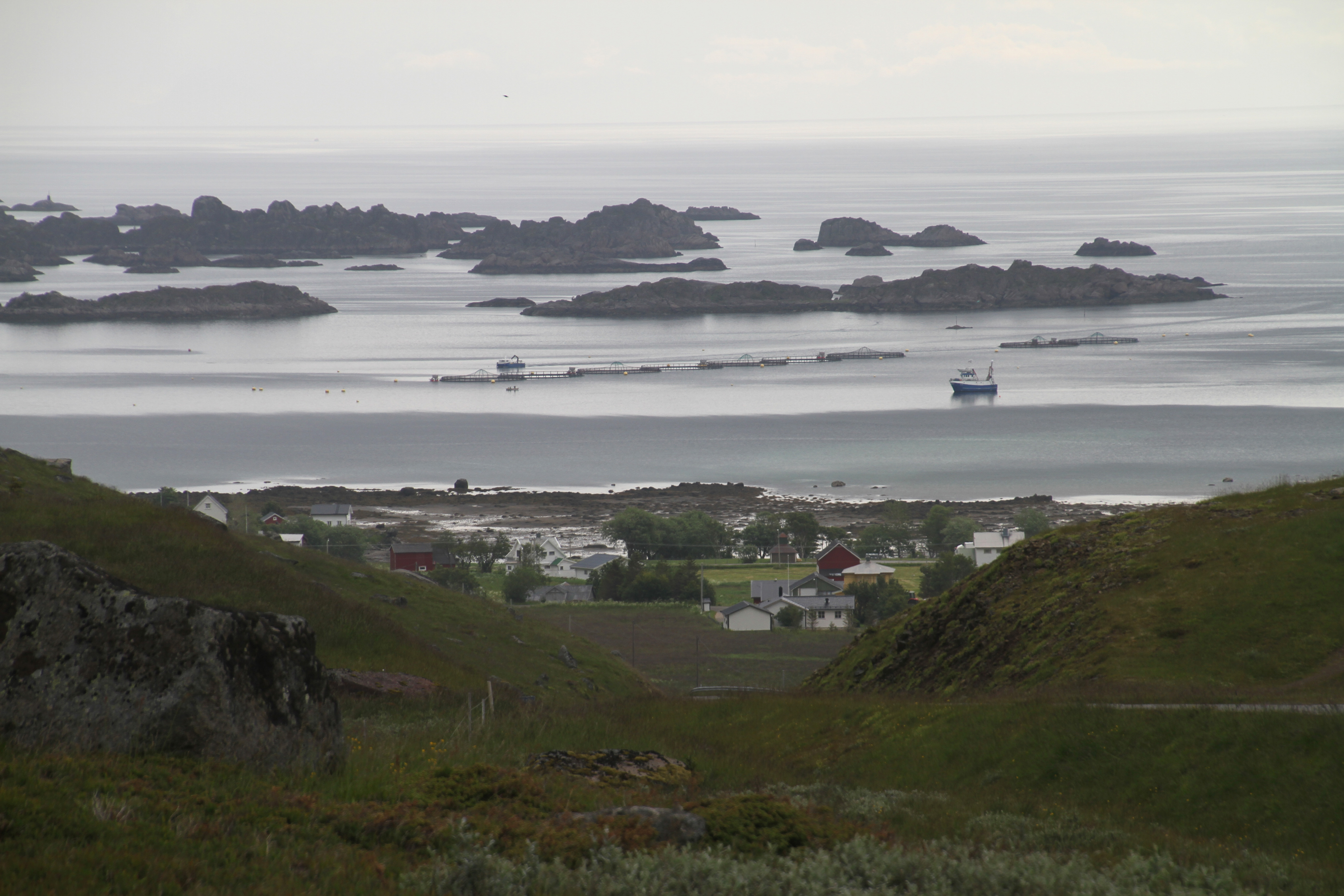 Sennesvik auf Vestvågøy (Lofoten, Norwegen)